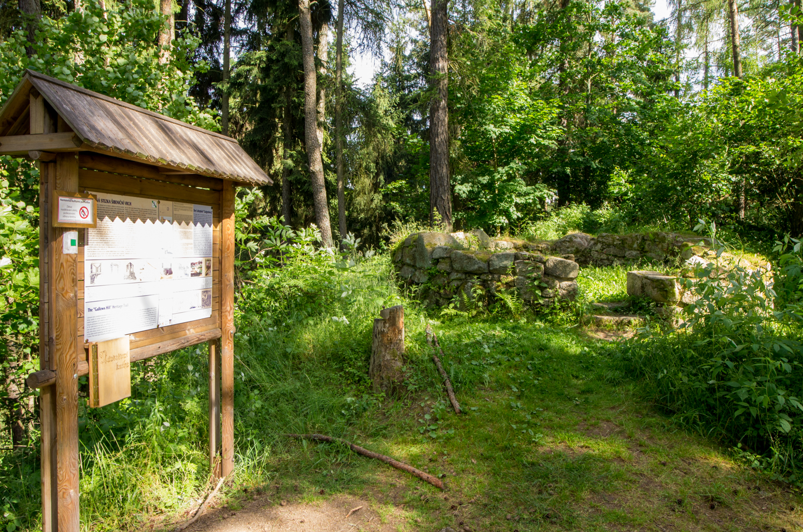 Popraviště - relikt kruhové šibenice (Bečov nad Teplou), Šibeniční vrch, Bečov nad Teplou